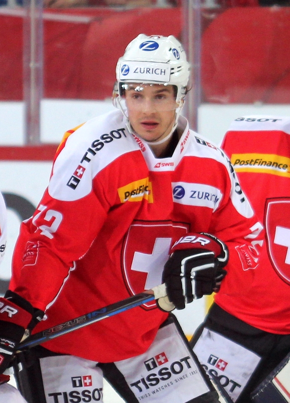 Denis Malgin (S 72).